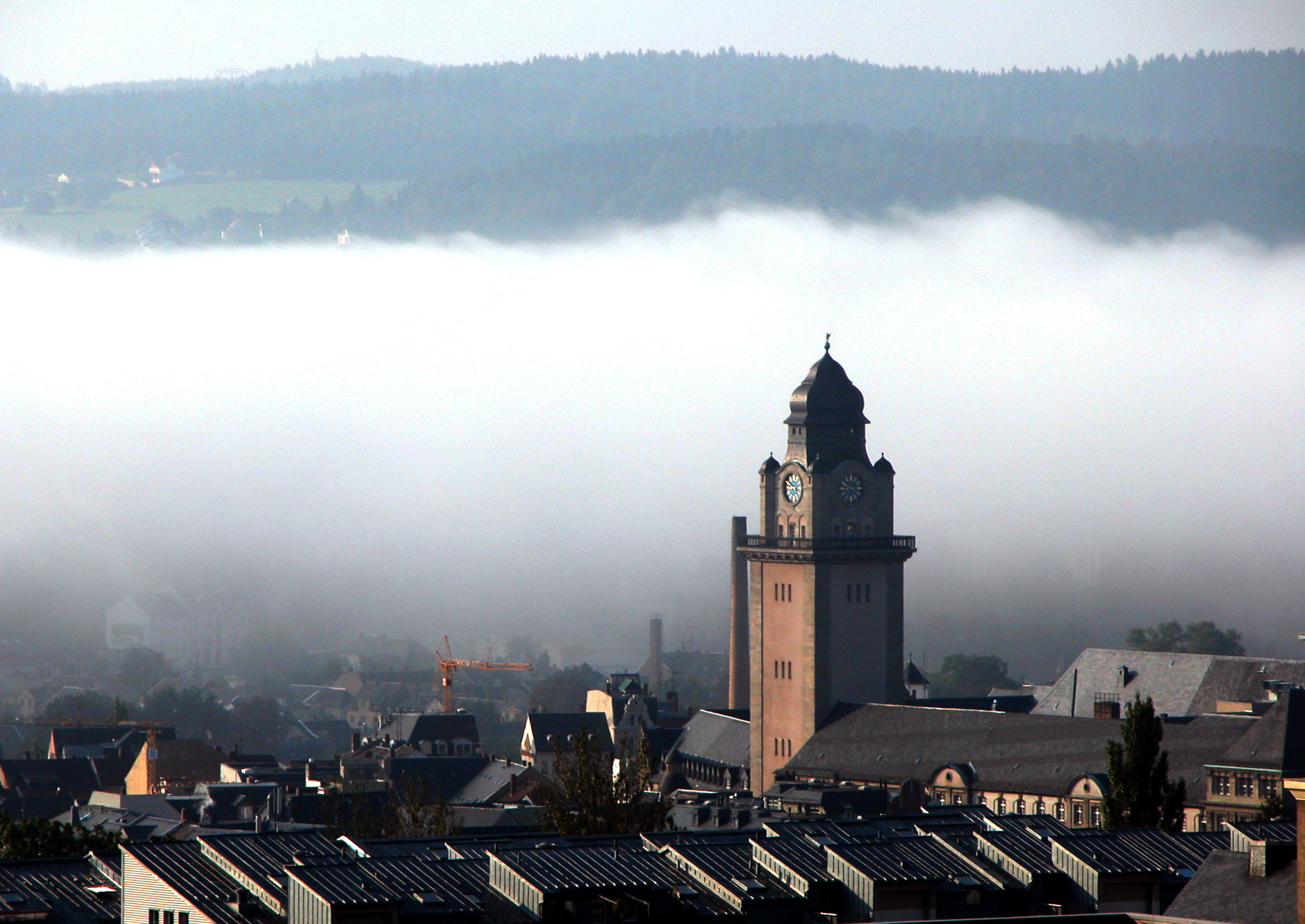 Plauen im Morgennebel-neuer Rathausturm